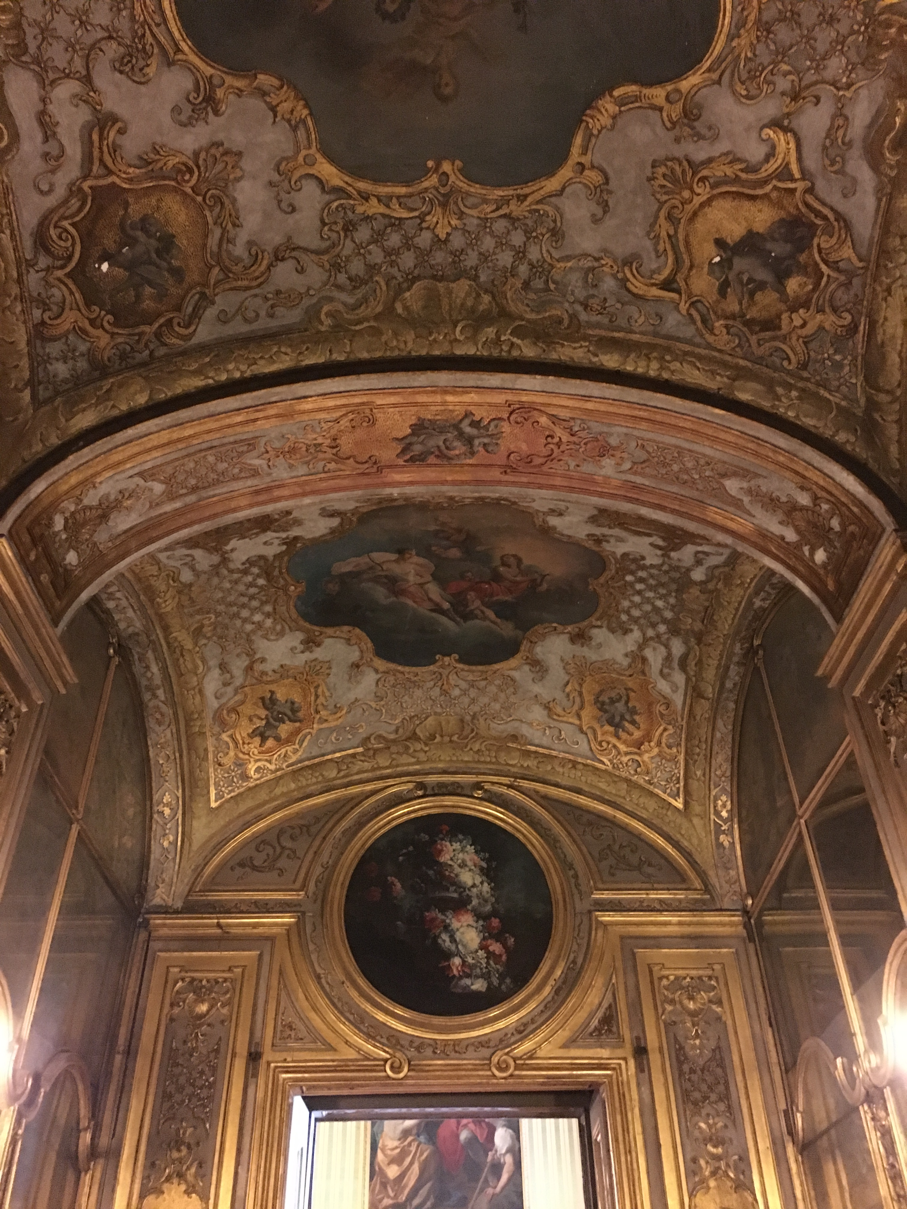 Camera di Carlo Alberto. Palazzo reale Torino